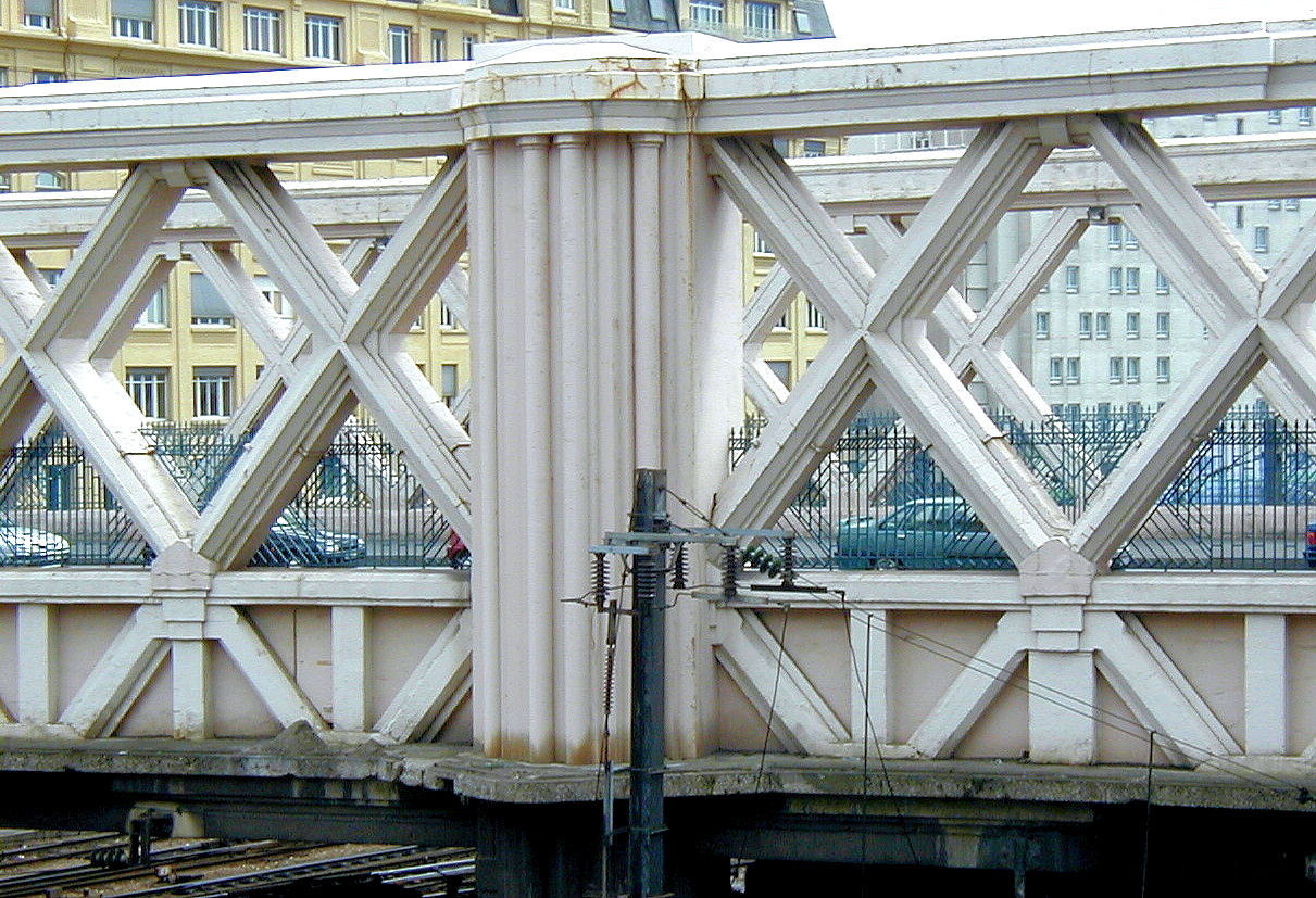 Paris - Pont La Fayette